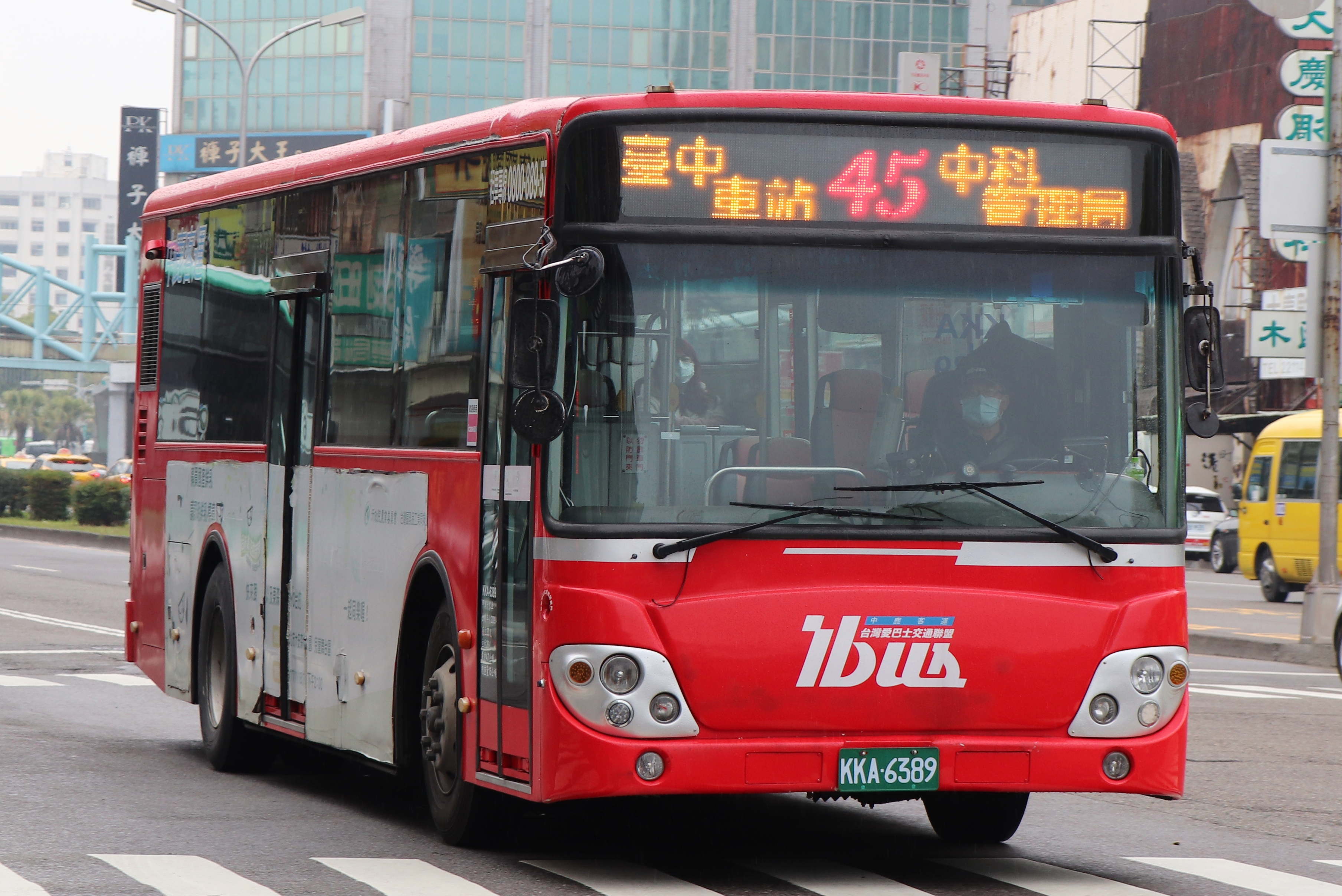 中鹿客運 大宇BC211M大客車 KKA-6389